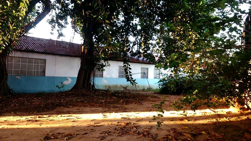 Estacionamento arborizado da escola